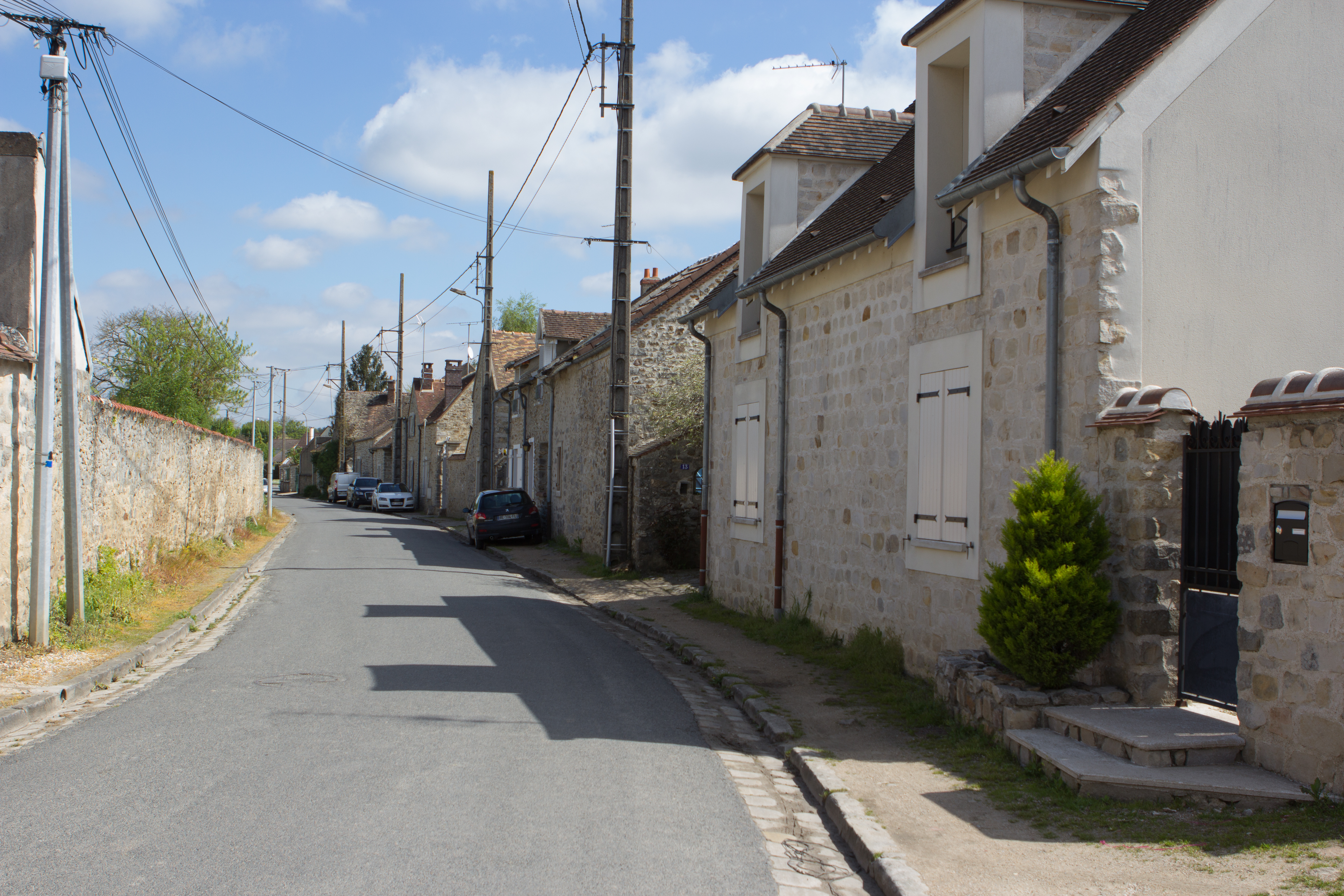 Rues de Chailly-en-Bière (Commune de Chailly-en-Bière, Seine-et-Marne, France)